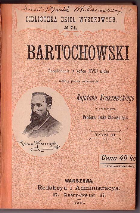 Беларуская (тарашкевіца): Вокладка кнігі Каетана Крашэўскага «Bartochowski»